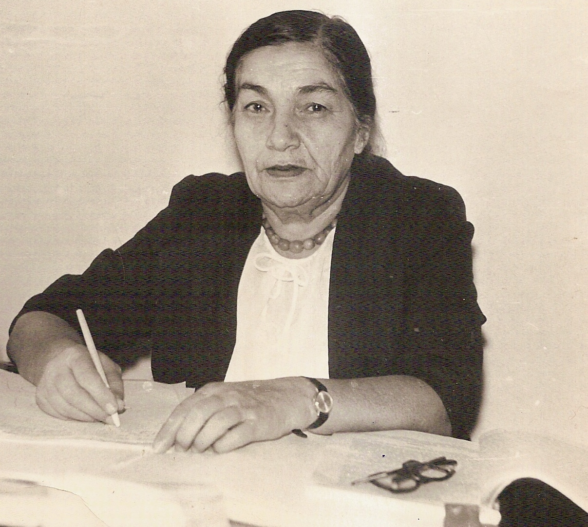 Կենսաբանական գիտությունների դոկտոր, պրոֆեսոր Նատալյա Մելիքյան